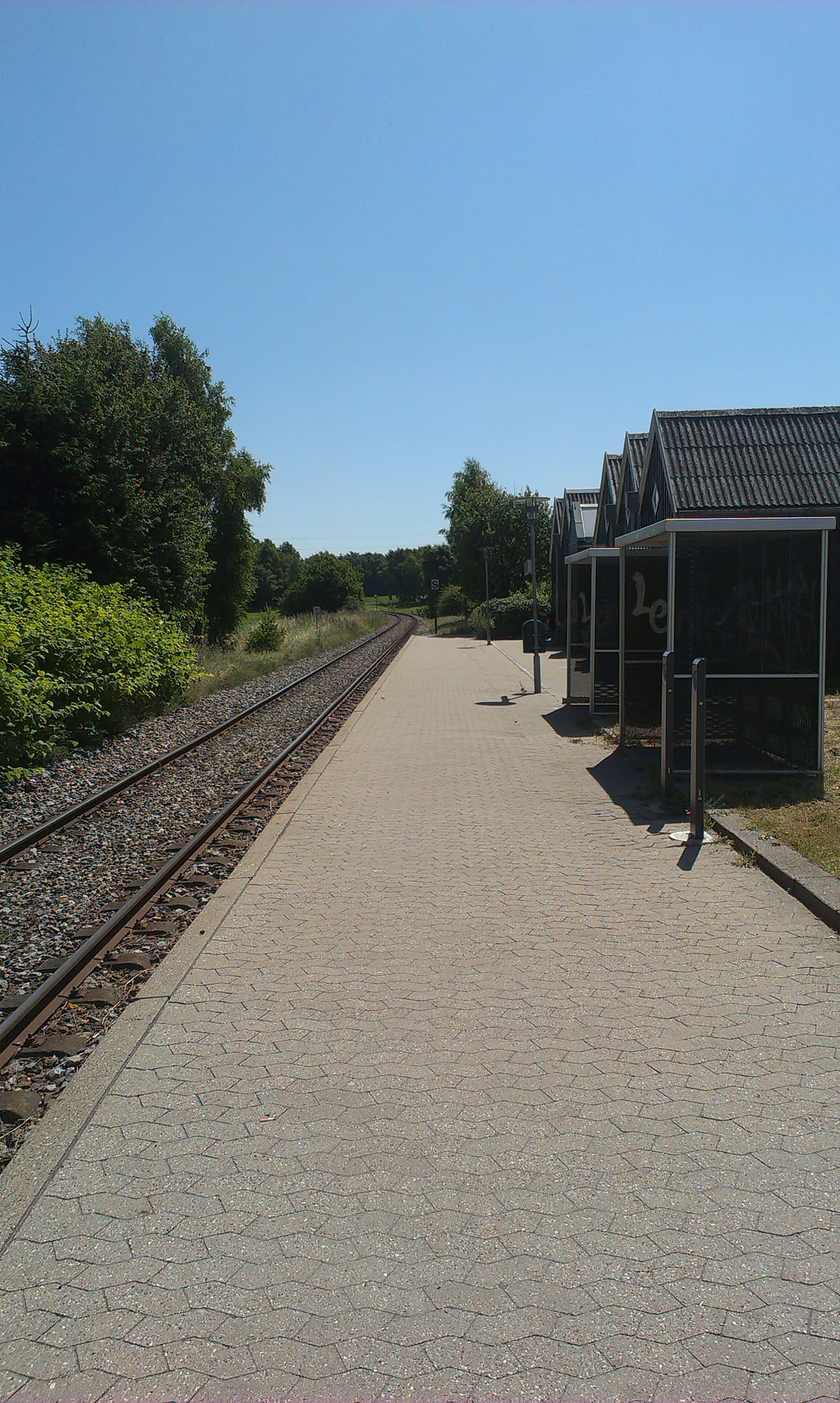 Græsted Syd st. 2013